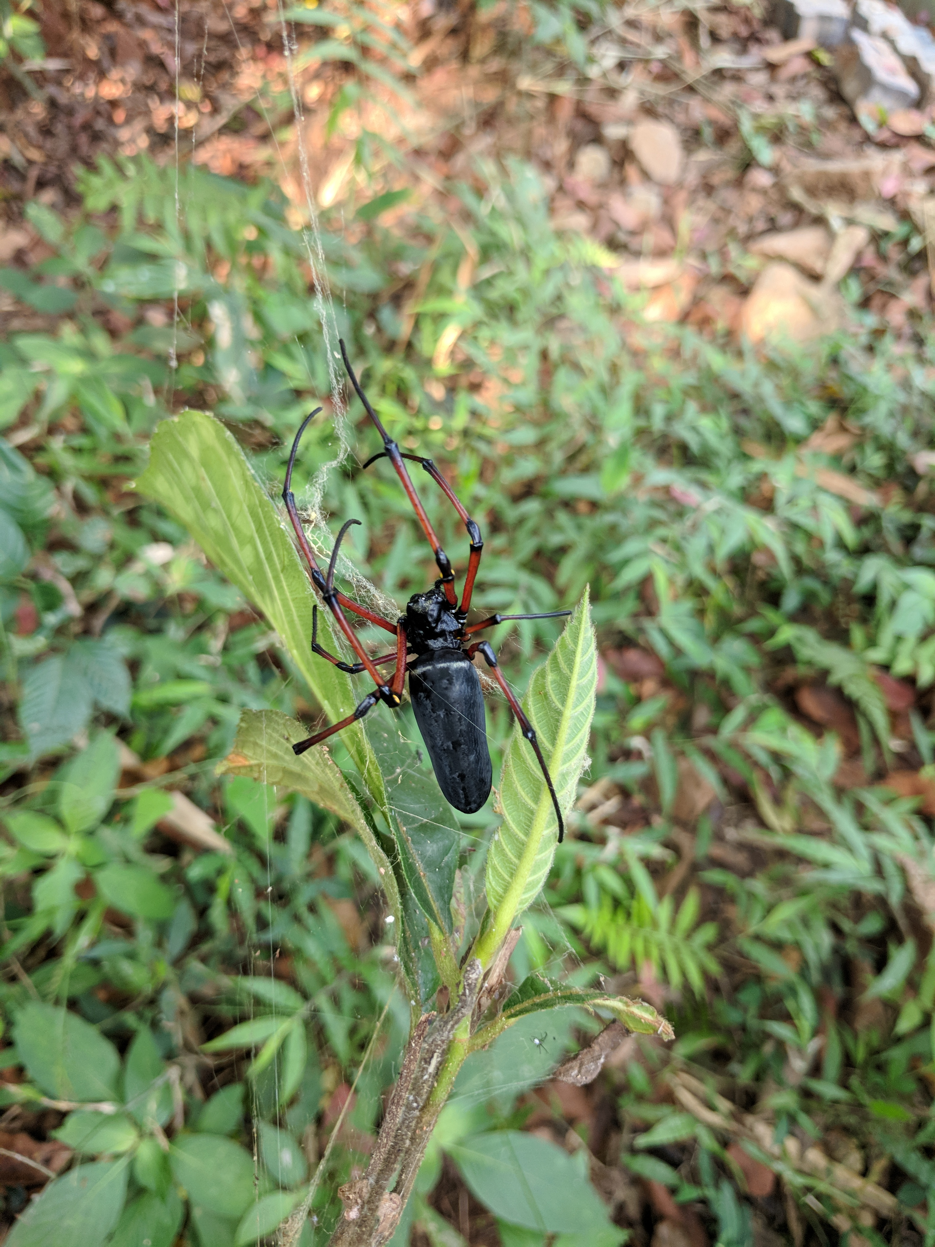 Wayanadu